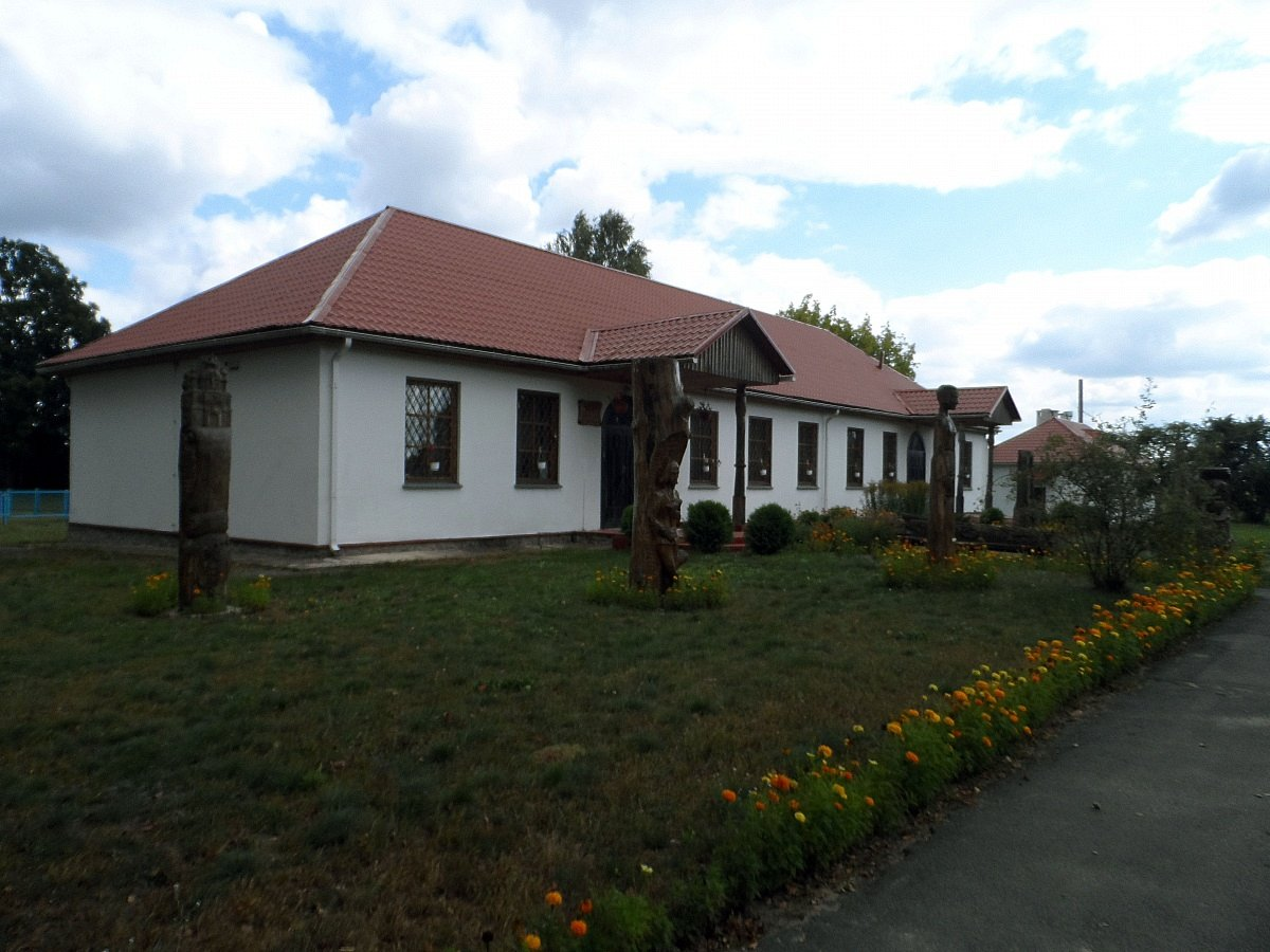 Варацэвічы. Музей